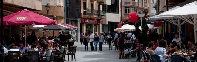 l